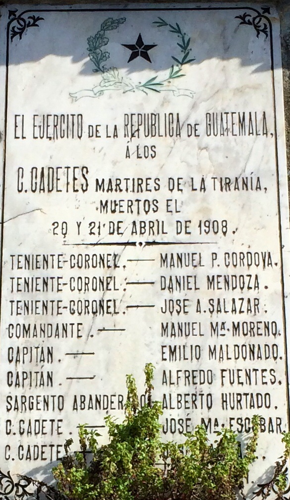 cadetestumba